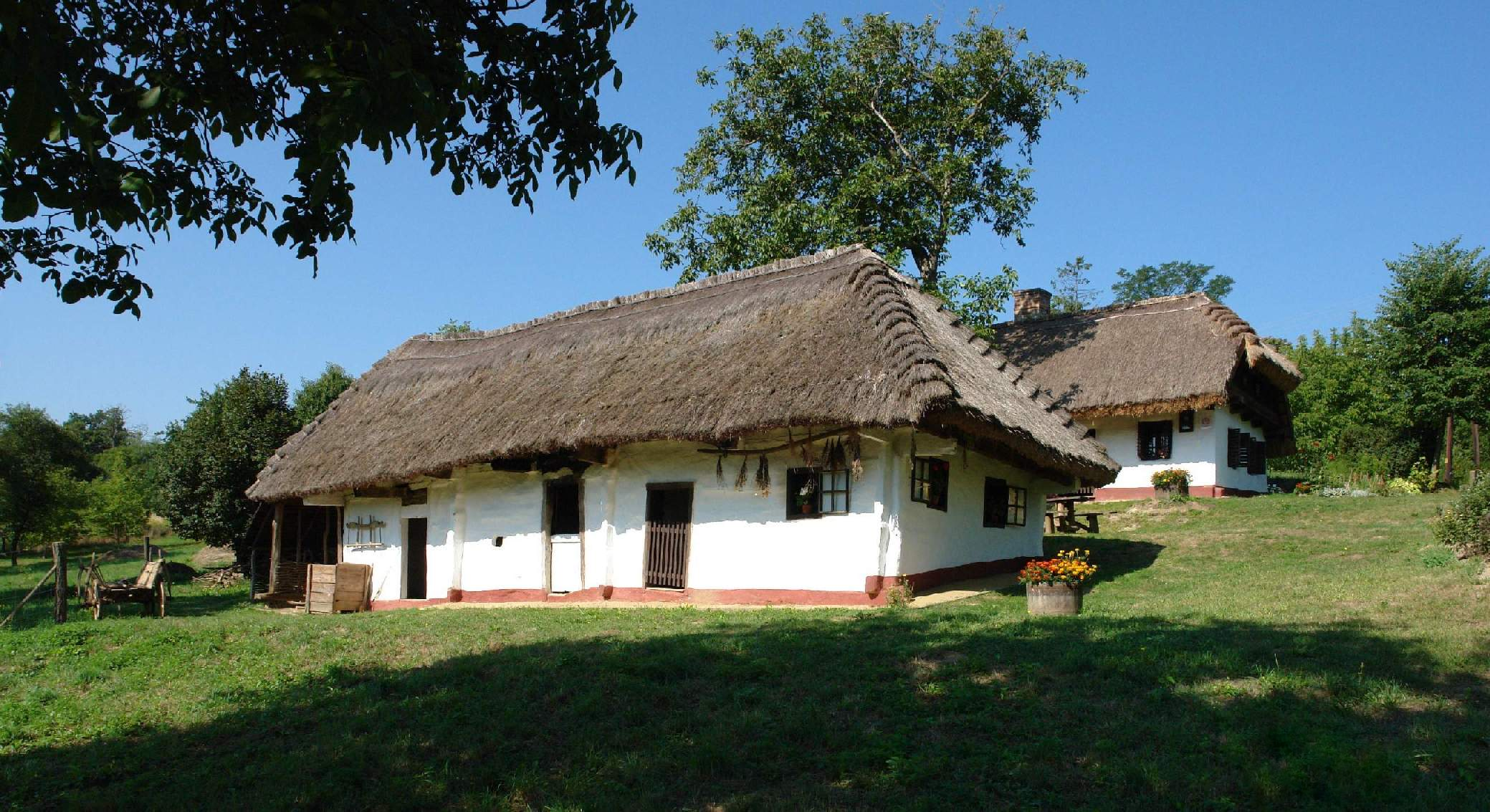 Népi lakóházak, Kávás, Templom utca 11. (a képen a felső épület) és Templom utca 13. (a képen az alsó épület, ami egyben múzeumház is This is a photo of a monument in Hungary. Identifier: 10845 This is a photo of a monument in Hungary. Identifier: 10846